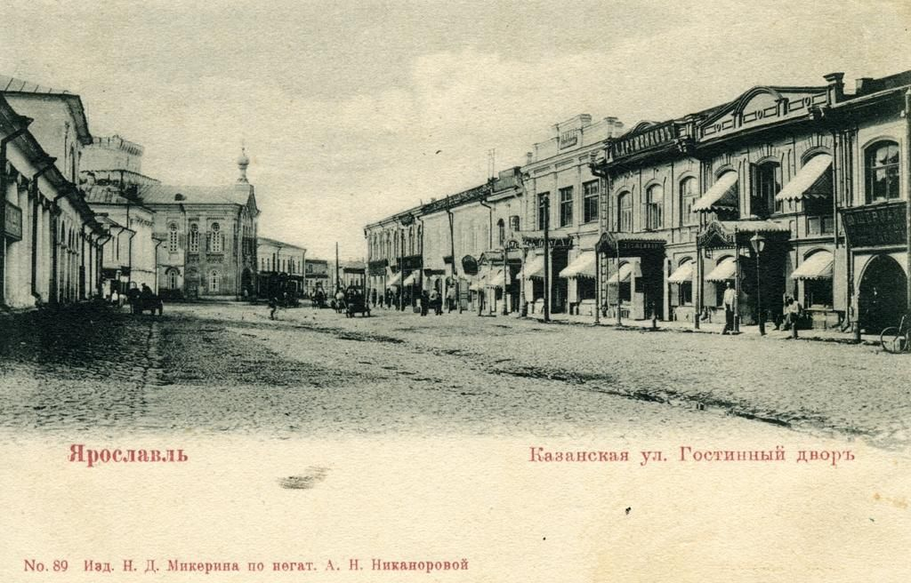 Казанская (Первомайская) улица и Гостиный двор в Ярославле